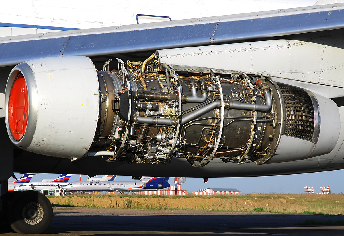 RA-86124 Engine.